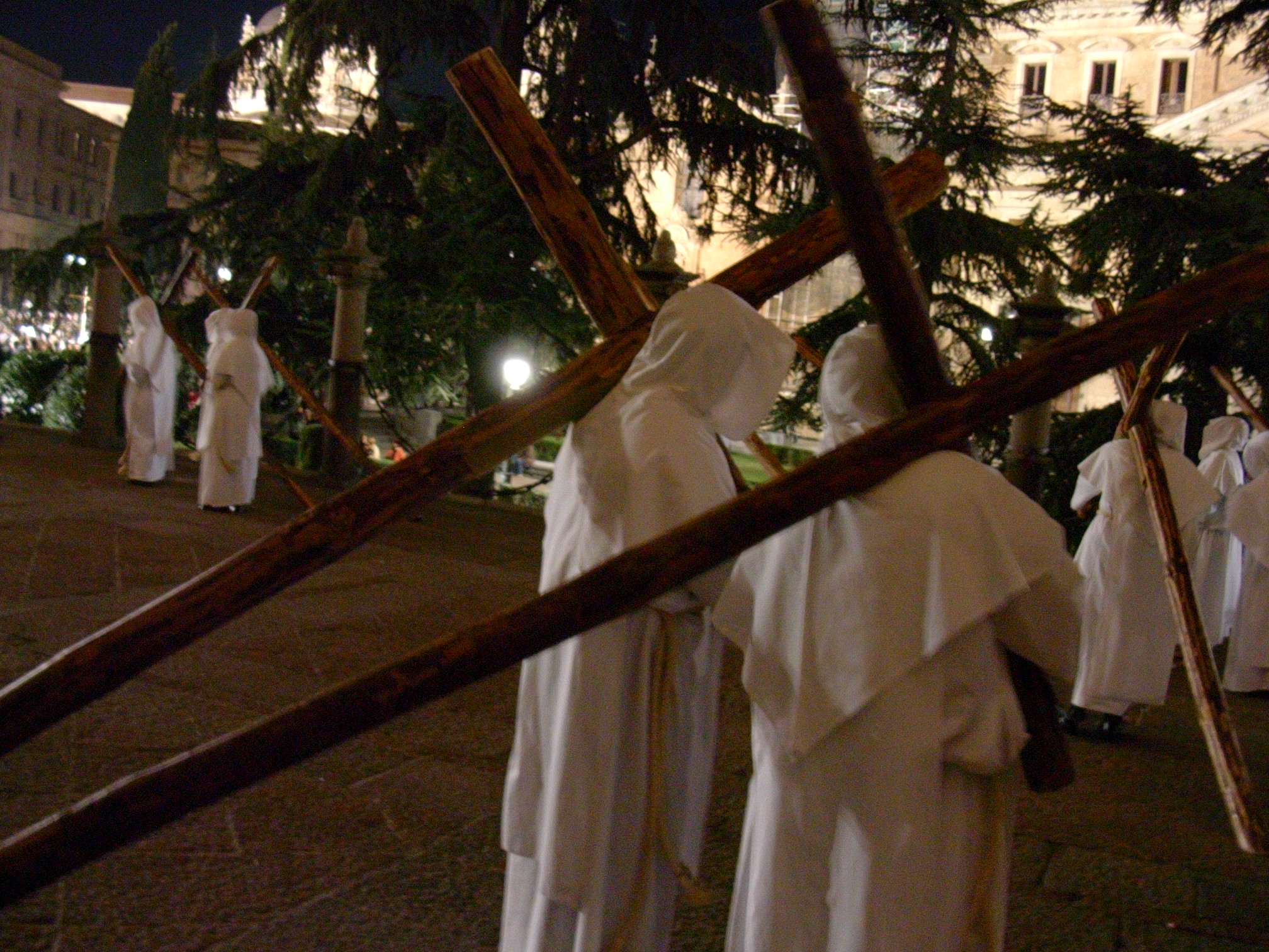 Nazarenos de la Hermandad del Cristo del Amor y de la Paz en Salamanca.